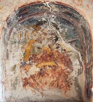 Пророкот Илија во пустина, Св. Илија Горни, с. Бањани, Скопско (втората деценија на XVI век)